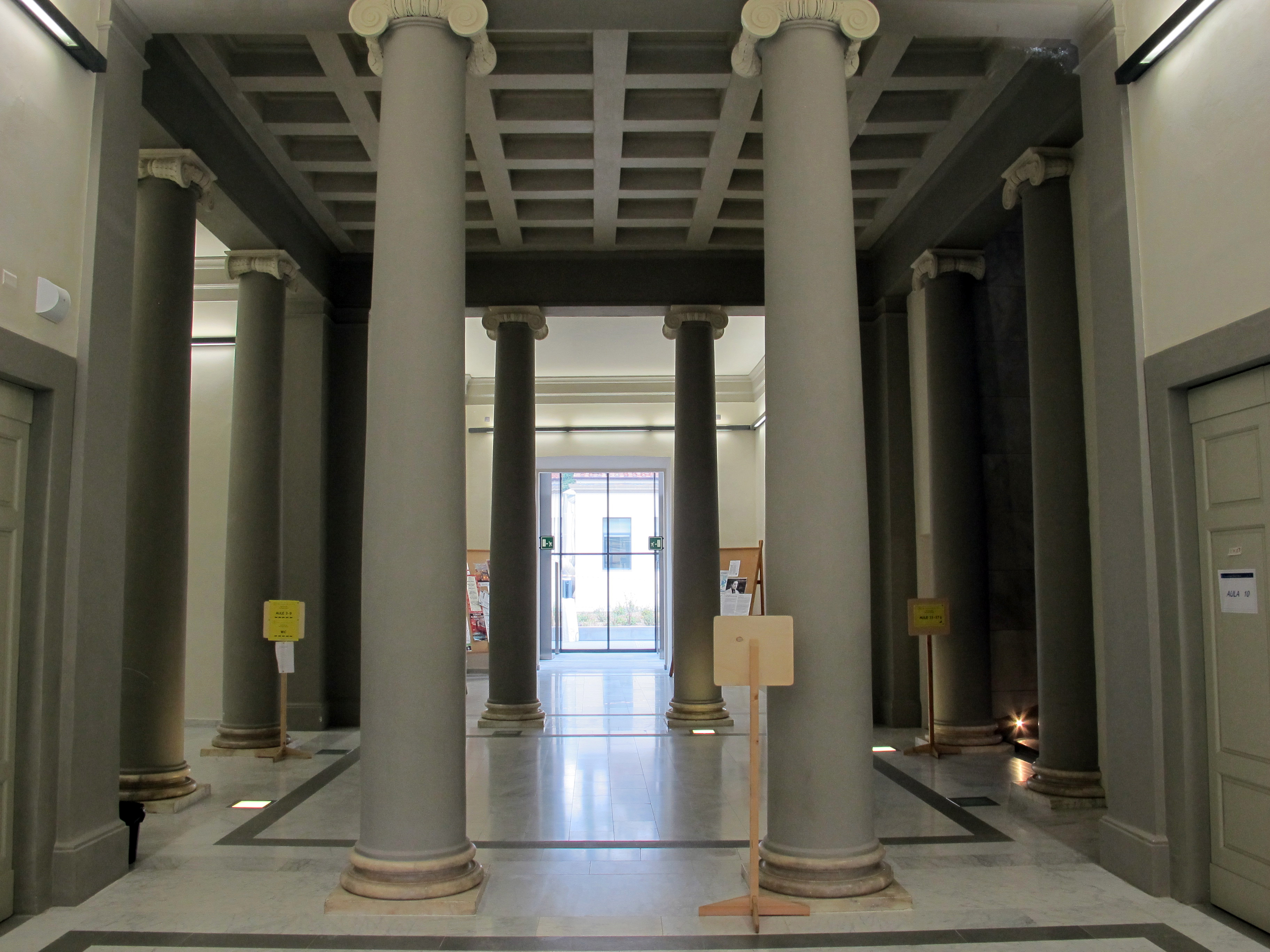 Palazzina de' Servi, interno